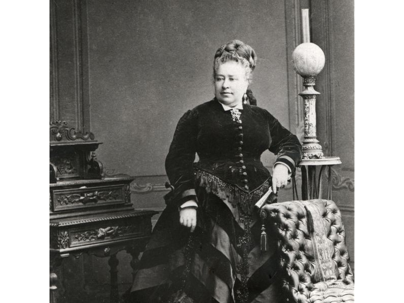 Photographie de Marguerite Boucicaut (1816-1887) dont la vie est associée au grand magasin parisien « Au Bon Marché » fondé par son mari Aristide Boucicaut. Elle légua à sa mort son immense fortune à des œuvres de bienfaisance, permettant entre autres la fondation de l'Hôpital Boucicaut à Paris.